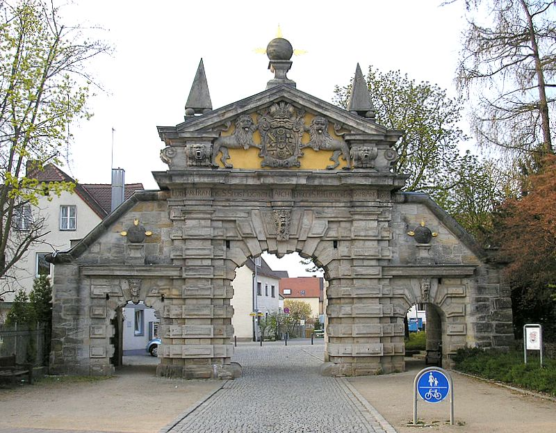 Festung Forchheim (Oberfranken). Das Nürnberger Tor" (1698). Eigene Aufnahme, April 2007/ Fortress Forchheim (Upper Franconia, Germany). The "Nuremberg gate" (1698). Own photo, April 2007